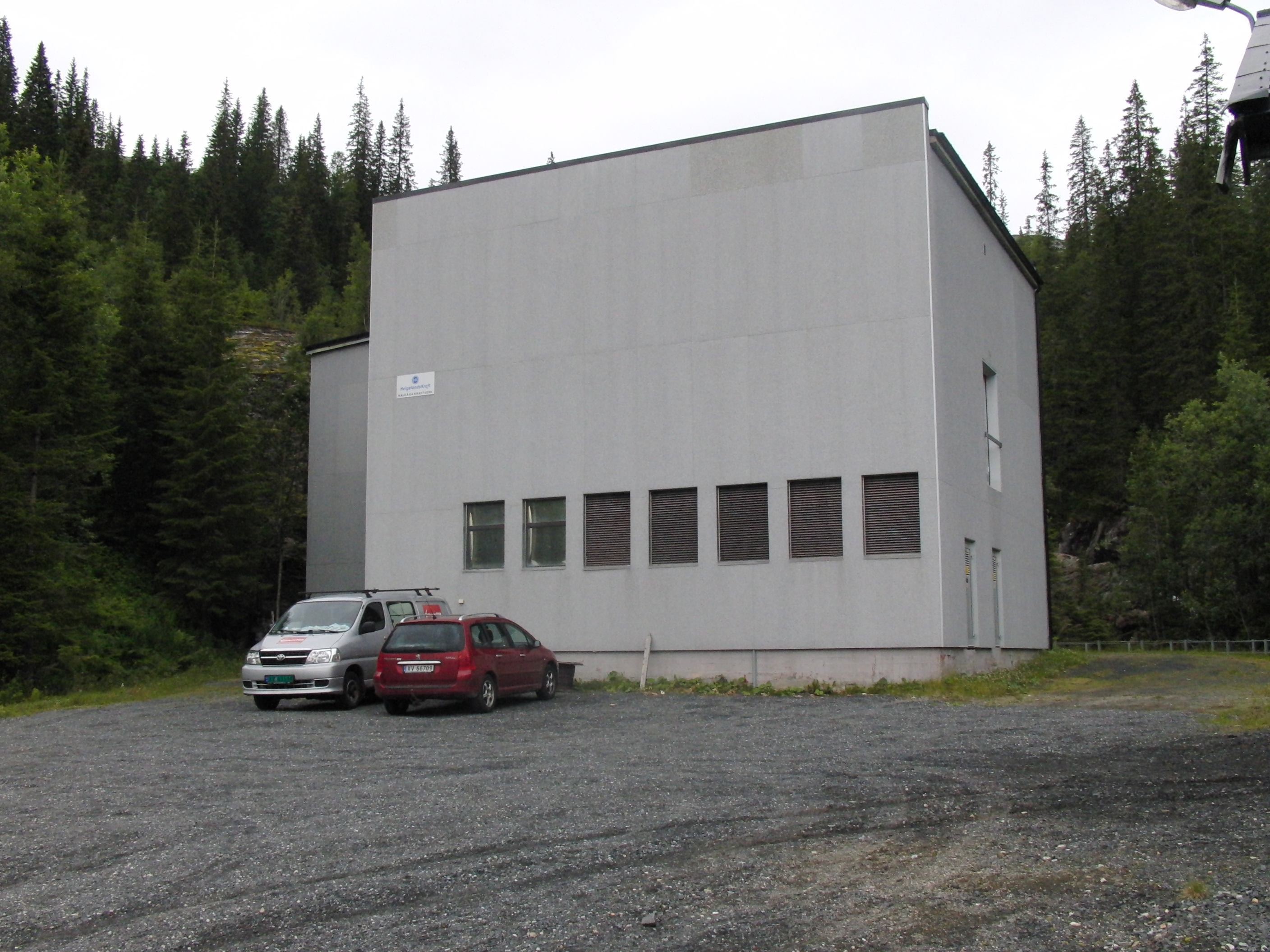 Kaldåga kraftverk